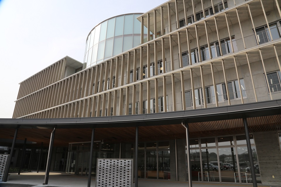 国東市役所